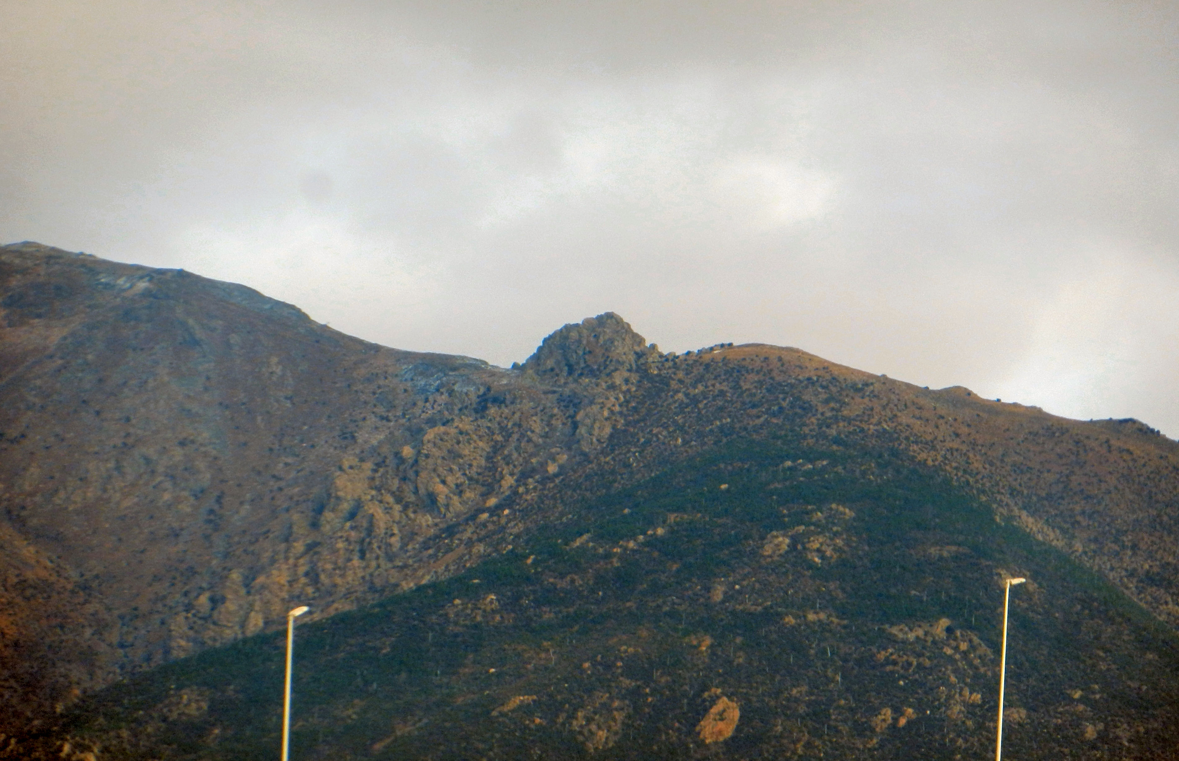 Genova, Val Varenna, la Punta del Corno vista da Pegli